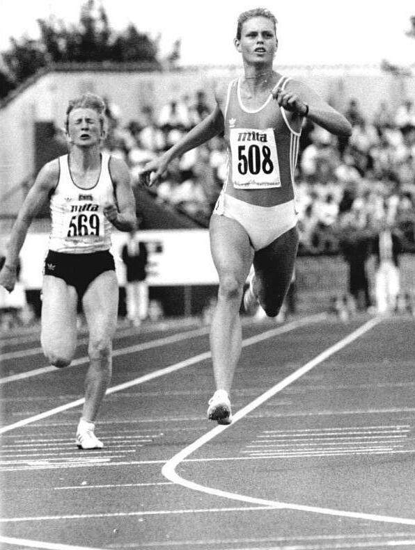 ADN-ZB-Koard- 5.8.89-Großbritannien: Leichtathletik-Europapokalfinale (A-Gruppe) in Gateshead- Die Neubrandenburger Juniorenweltmeisterin Katrin Krabbe (r) feierte über 100 Meter mit 11,14 s einen glänzenden Erfolg und siegte in der ersten Entscheidung überlegen. Joanna Smolarek (VRP) kam mit 11,64 s auf den fünften Platz.